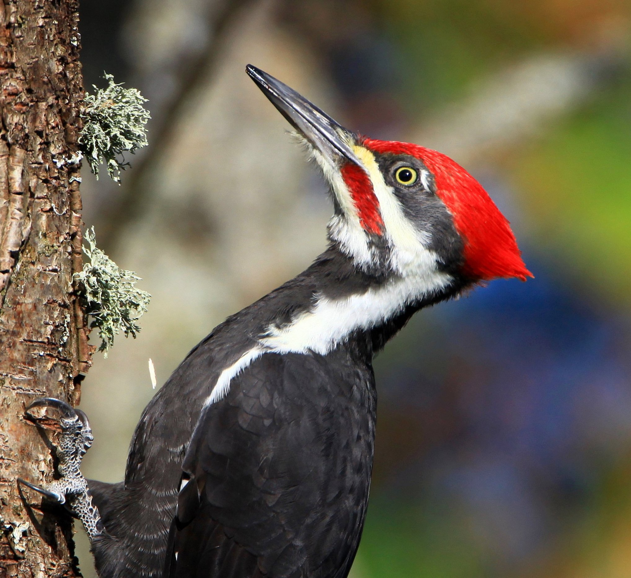 IMG_0706-2